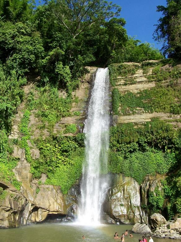 মৌলোভীবাজার জেলার উপজেলায় থানায় অবস্তিত বাংলাদেশের বৃহত্তম একমাত্র প্রাকৃতিক জলপ্রপাত মাধবকুন্ড।